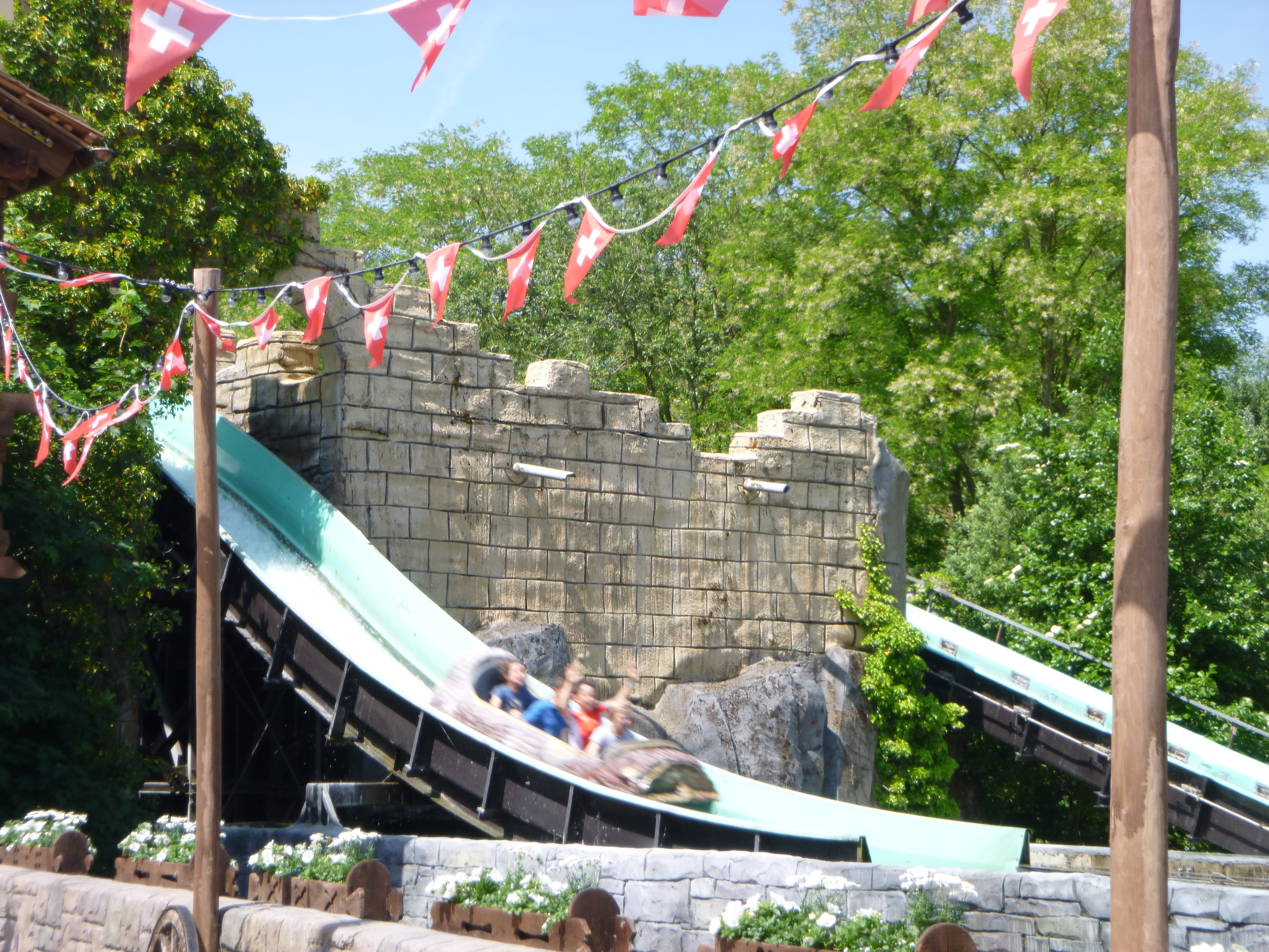 De Boomstammetjes depuis le quartier Heidi Plopsaland